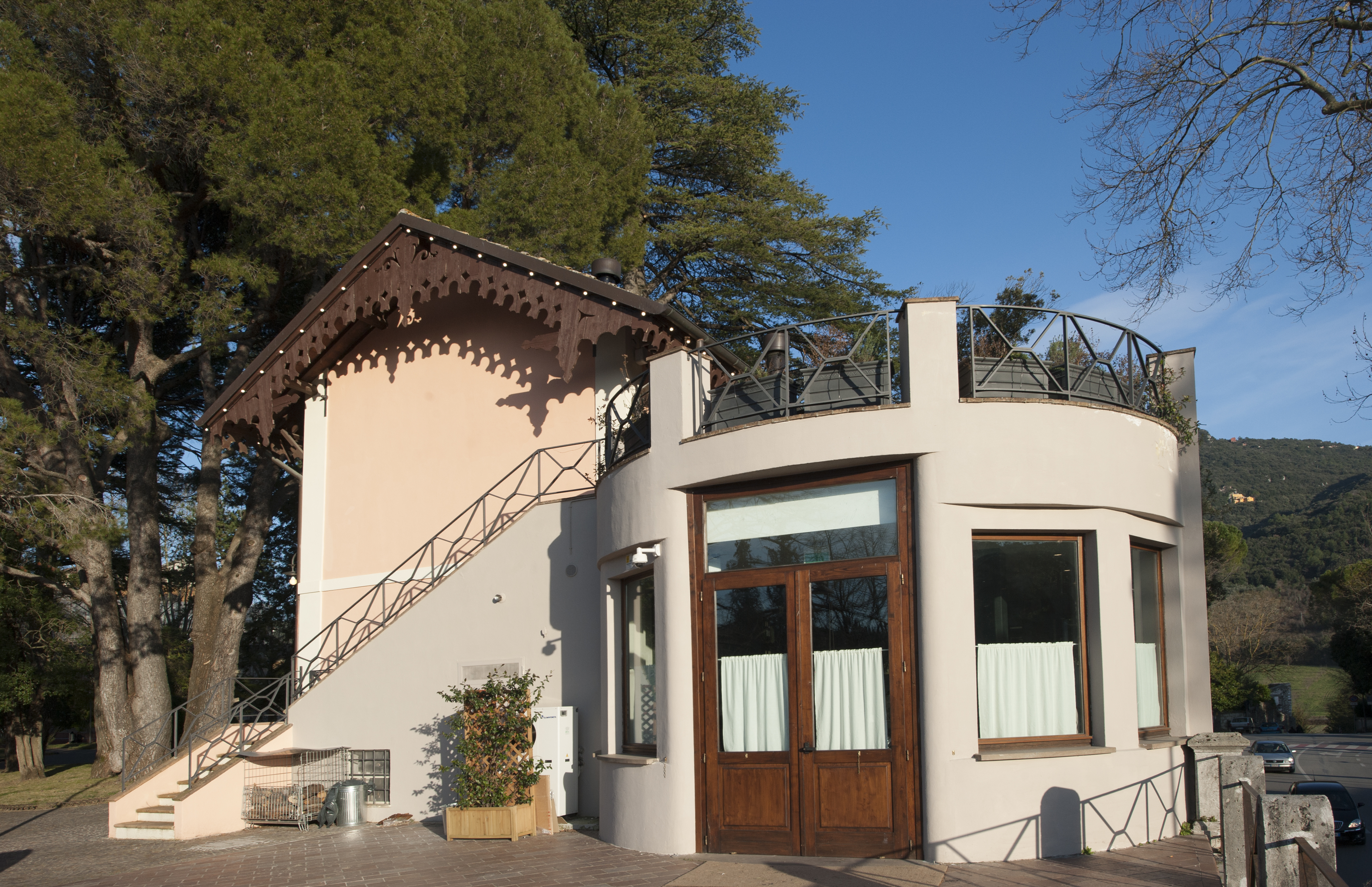 Spoleto - Casina dell'Ippocastano